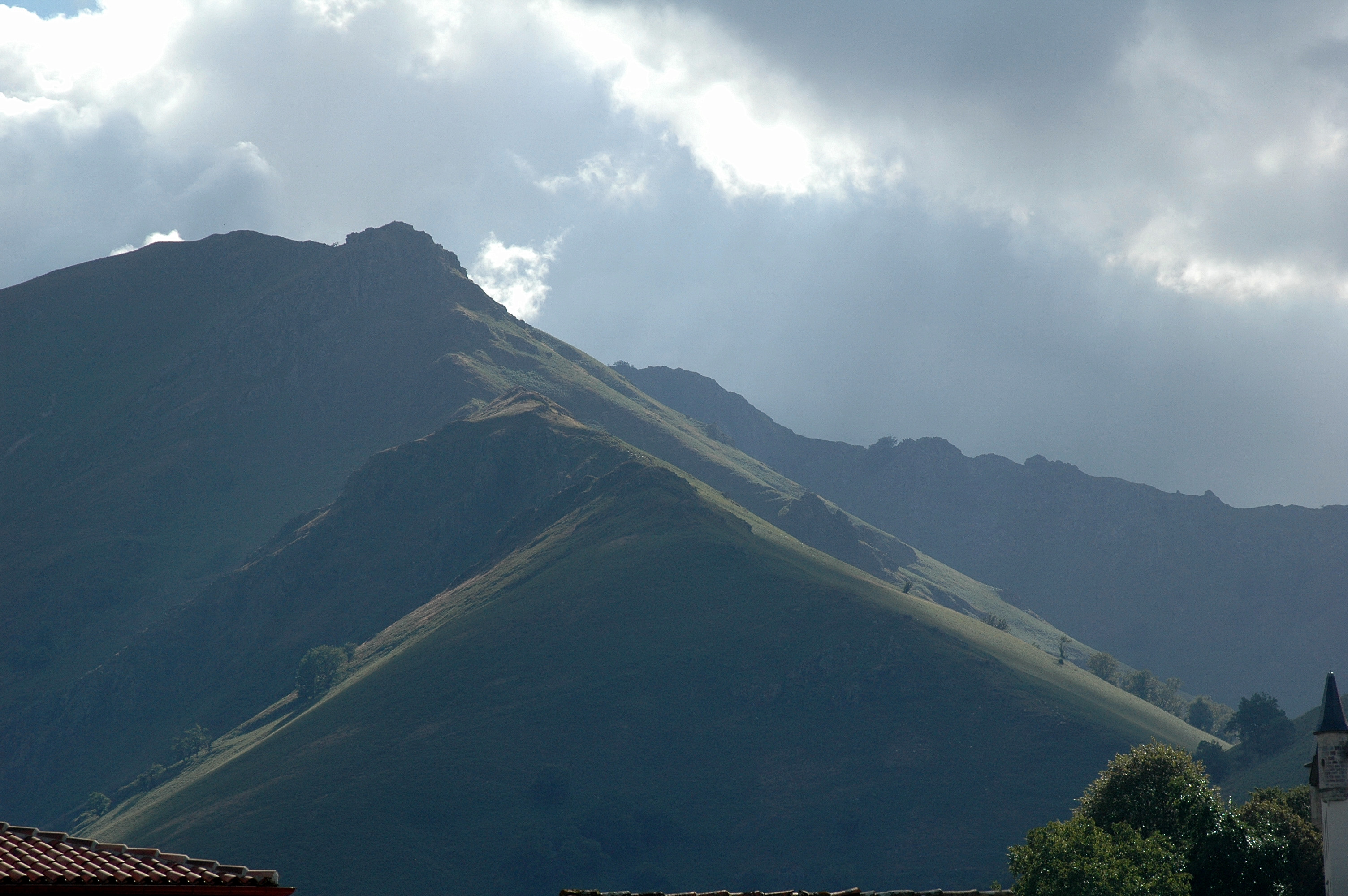 Saint-Étienne-de-Baïgorry, les crêtes d'Iparla. Photo prise le 03/08/06 par Harrieta171